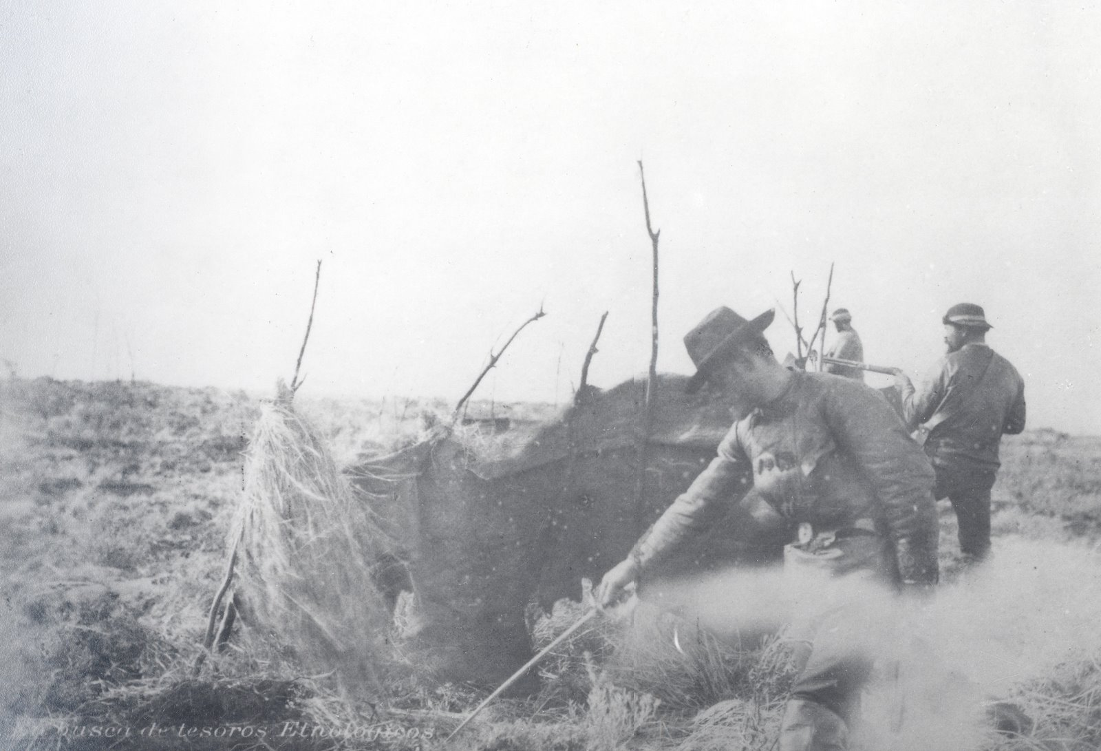 Artefactos indígenas saqueados durante las expediciones de Popper.